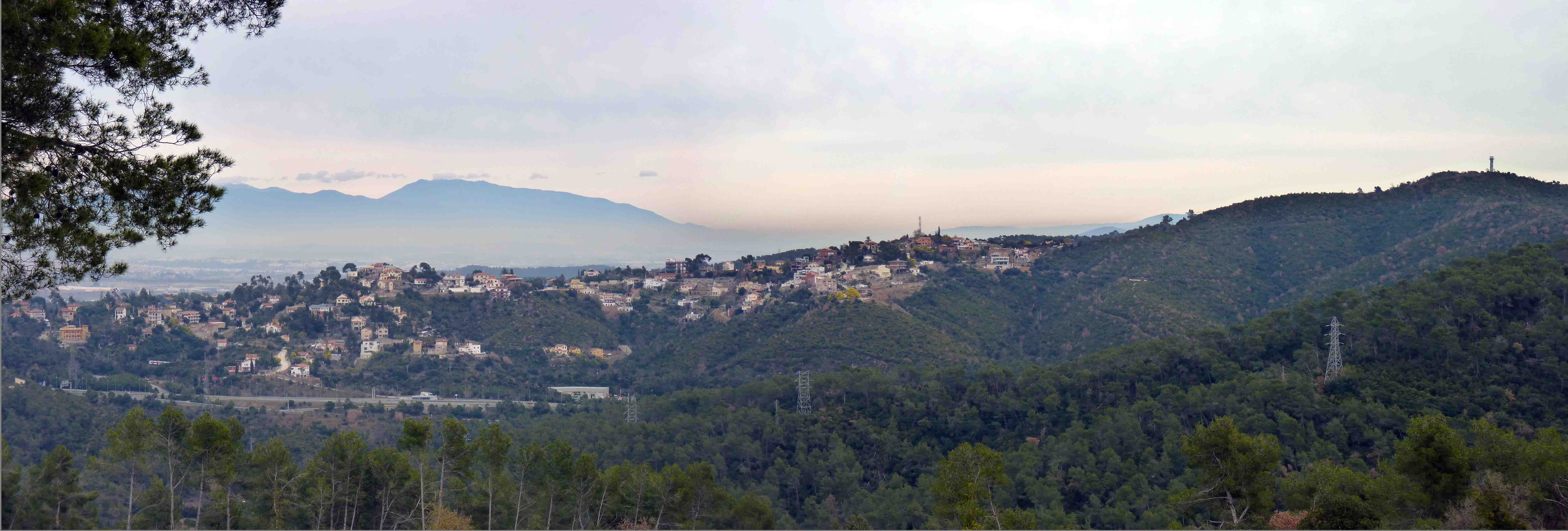 Panoramica de la Floresta presa desde Can Galopa de Dalt